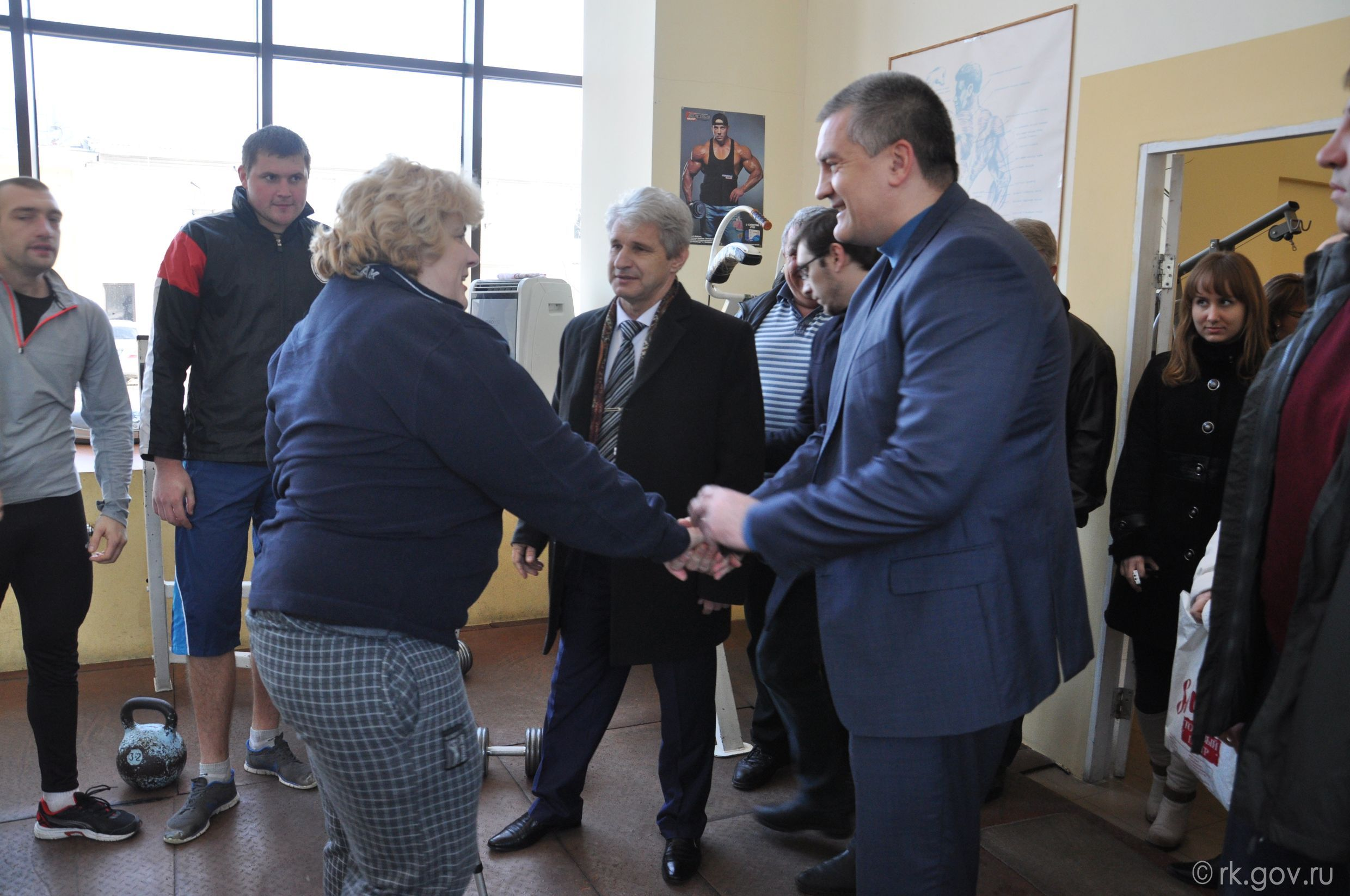 Глава Республики Крым Сергей Аксёнов побывал на тренировке спортсменов детско-юношеской спортивно-адаптивной школы «Инваспорт» в спортивном комплексе «Локомотив».